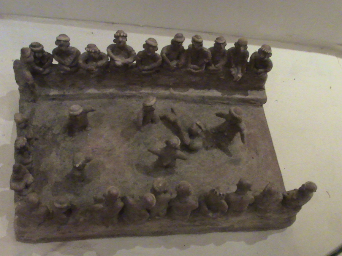 Escena de juego de pelota en barro de Teuchitlán, Jalisco, México. Zona arqueológica de Guachimontones.